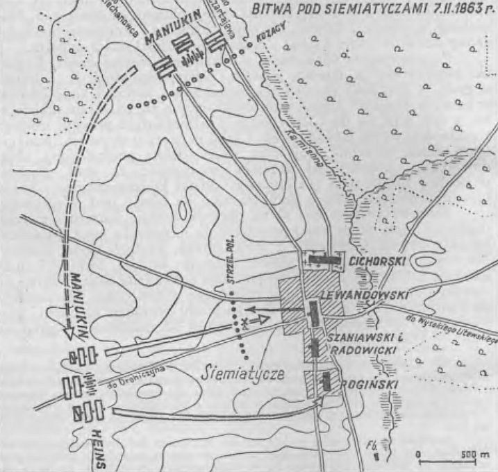 Plan bitwy pod Siemiatyczami w 1863